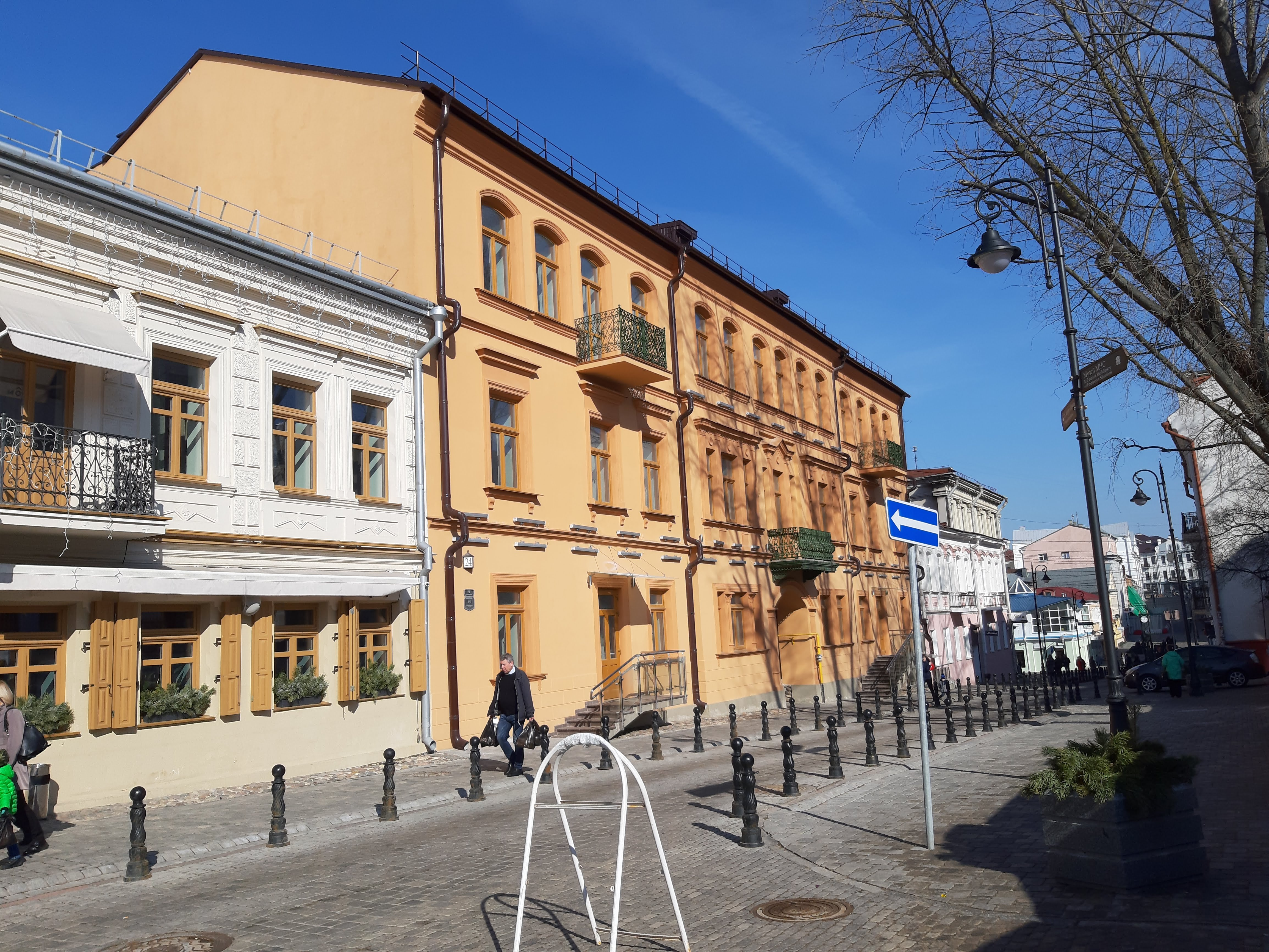 Мінск. Рэвалюцыйная вуліца ў сакавіку 2019